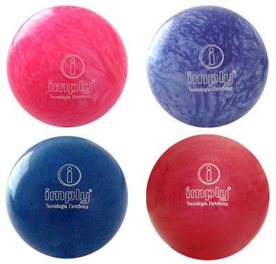 Bolas de boliche.